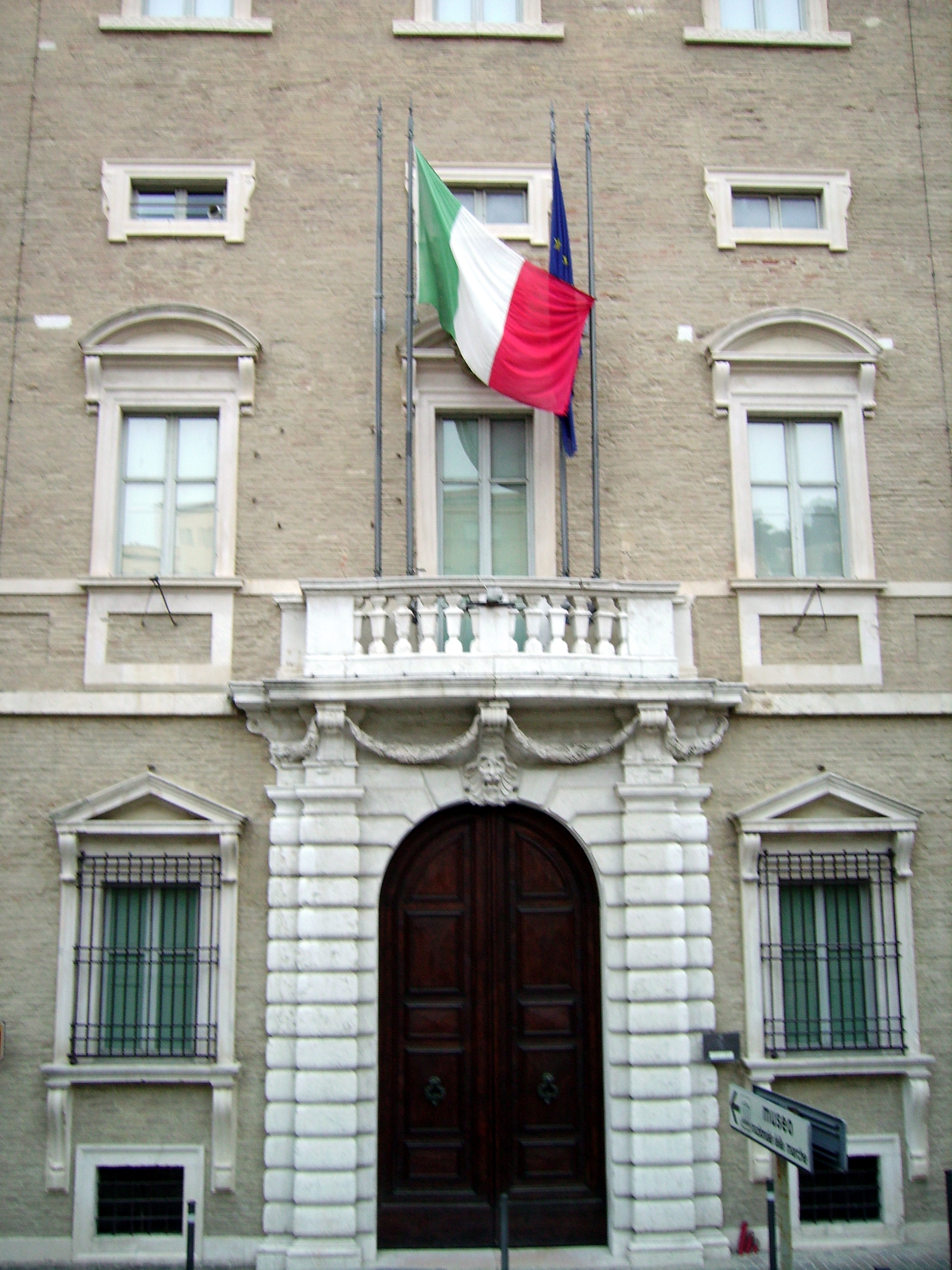 Museo archeologico nazionale delle Marche, ospitato in palazzo Ferretti